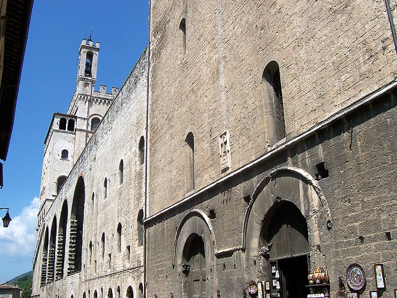 Gubbio - Palazzo dei Consoli